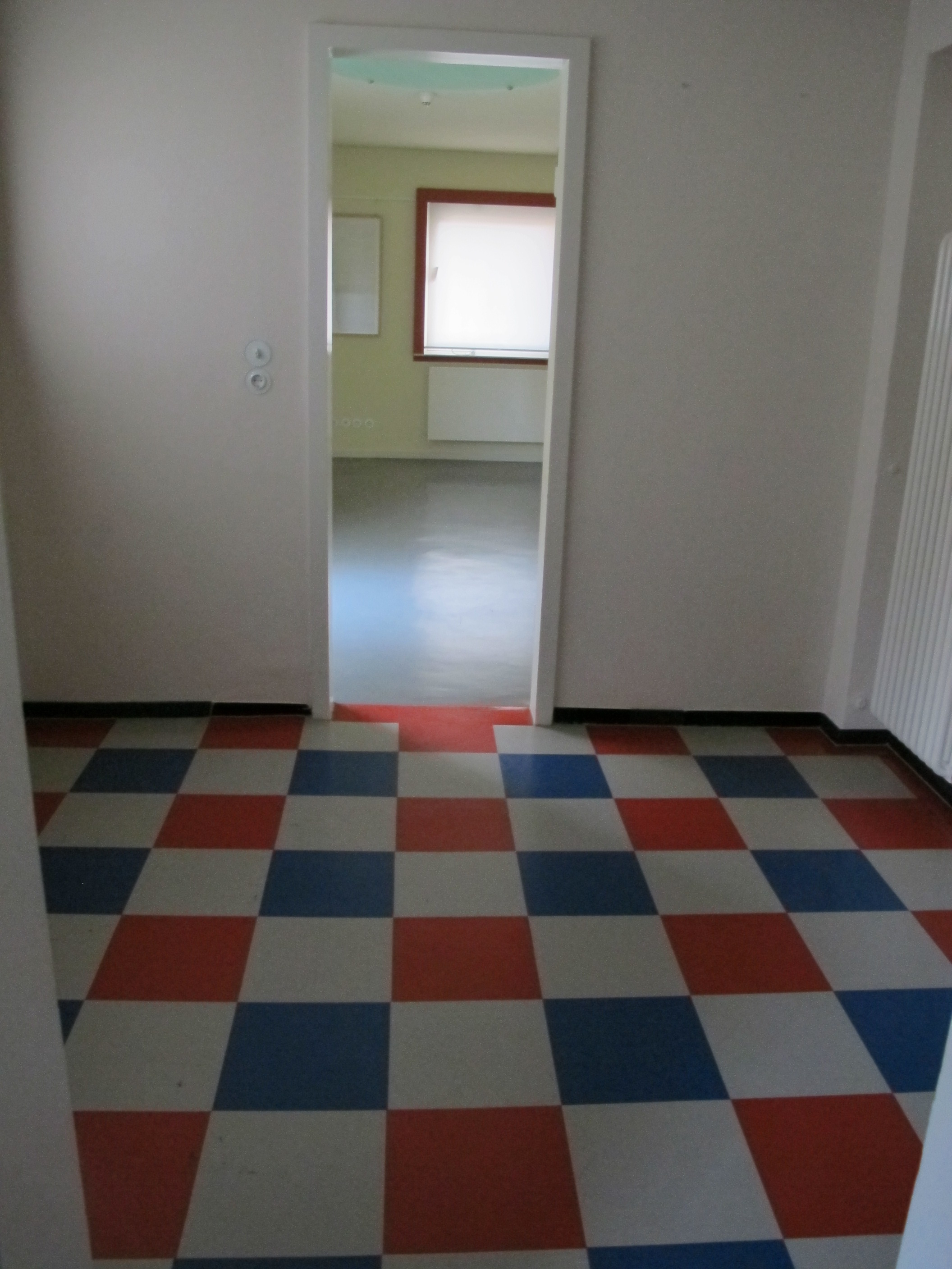 Haus am Horn, interior